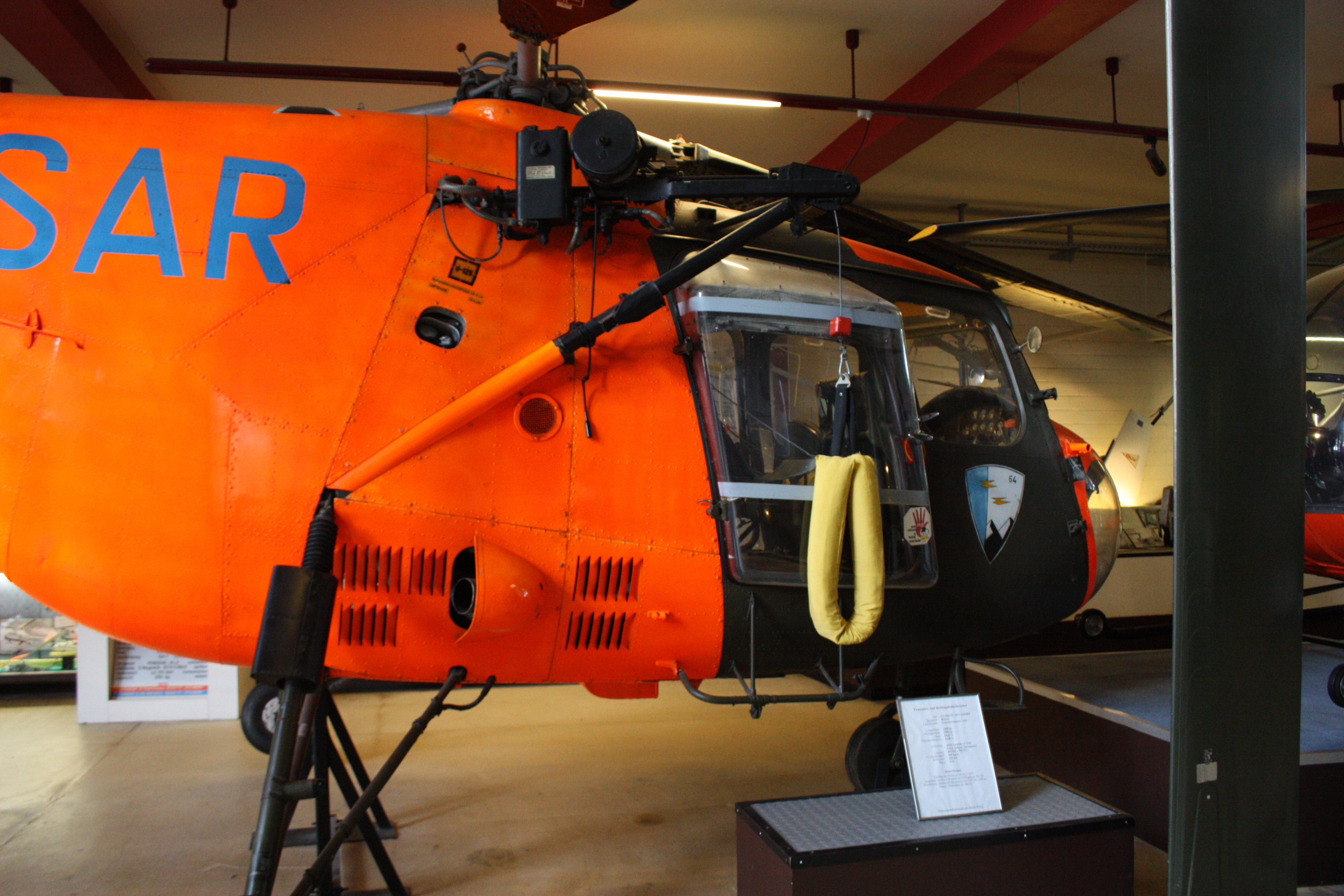 Hubschraubermuseum Bückeburg